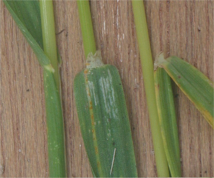 (Veldbeemdgras tongtje) Poa pratensis ligula